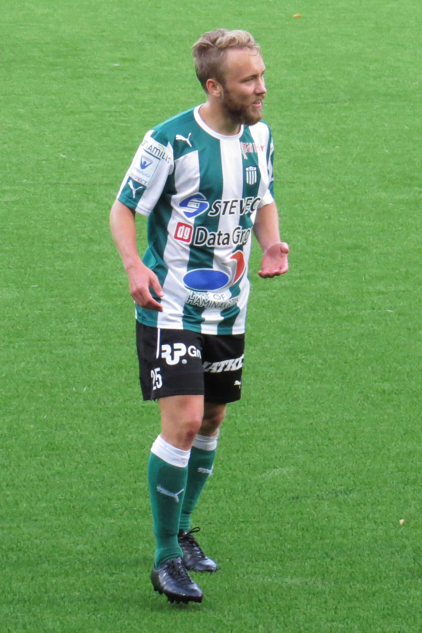 Eetu Muinonen, suomalainen jalkapalloilija FC KTP:n joukkueessa kaudella 2015.